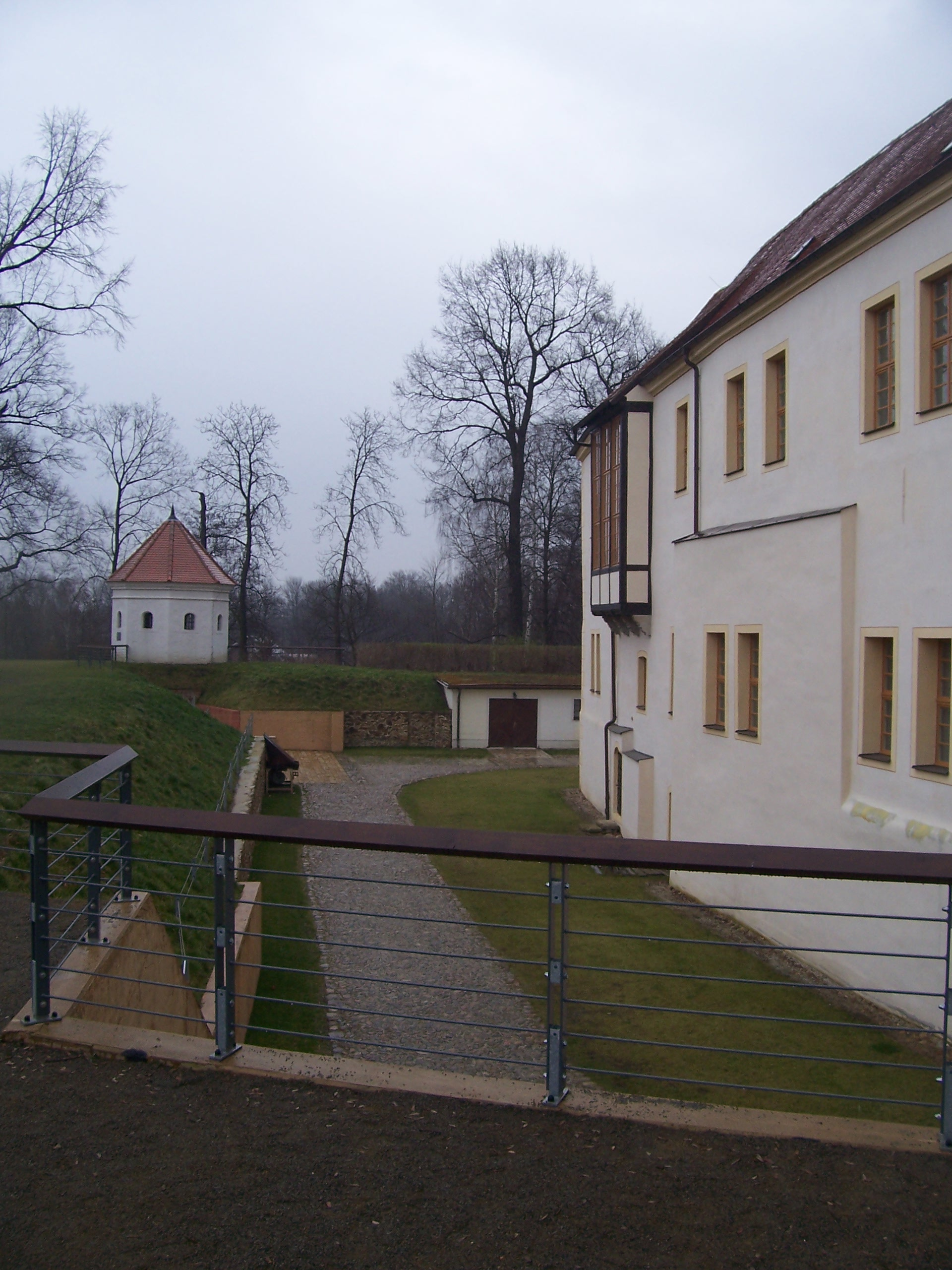 Pulverturm des Senftenberger Schlosses.